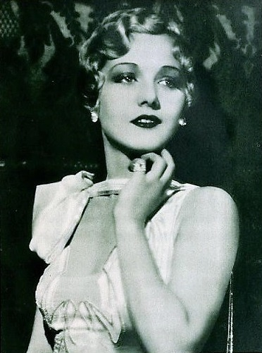 Leila Hyams